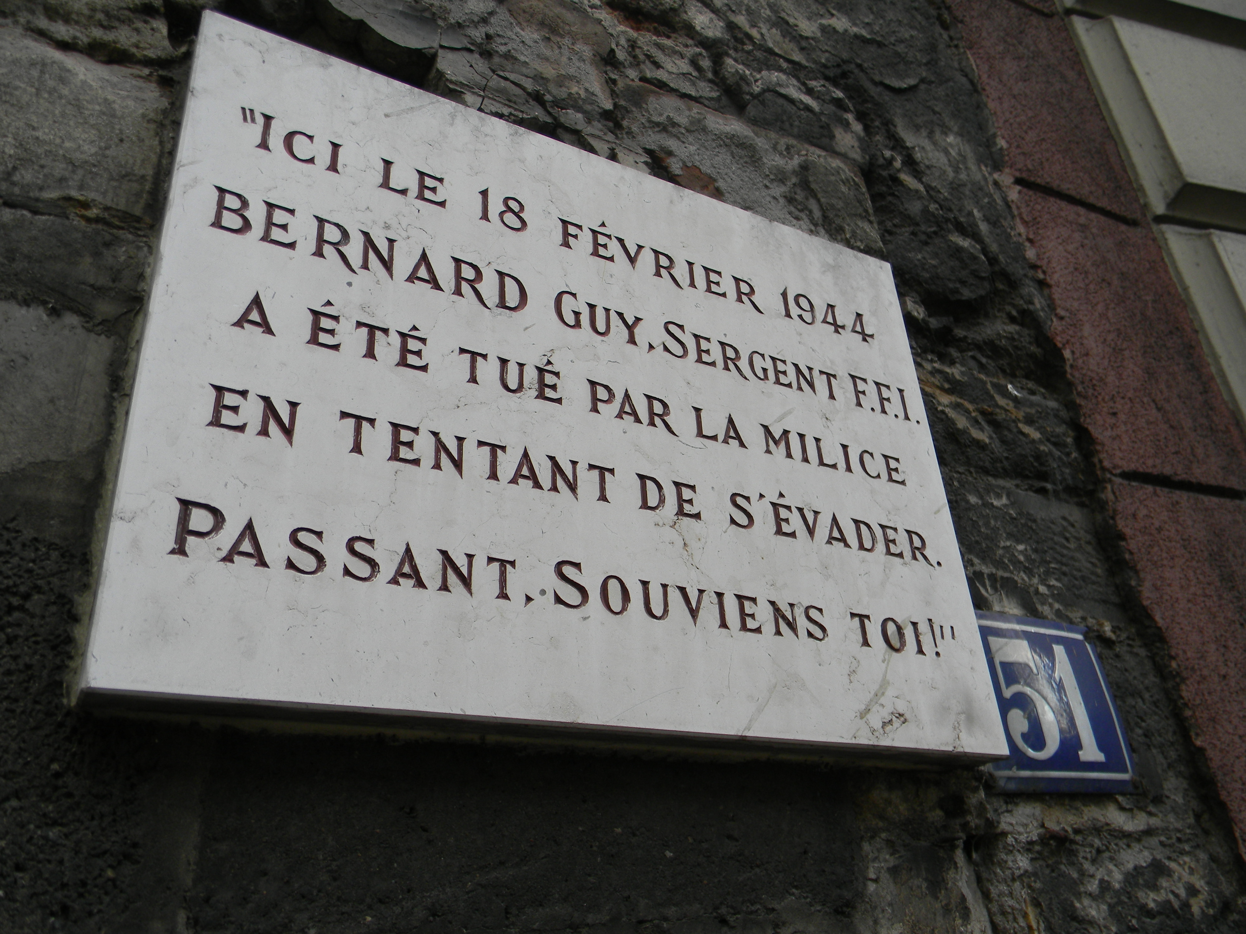 "Ici le 18 février 1944 BERNARD Guy, Sergent F.F.I. a été tué par la milice en tentant de s'évader. Passant, souviens toi!"